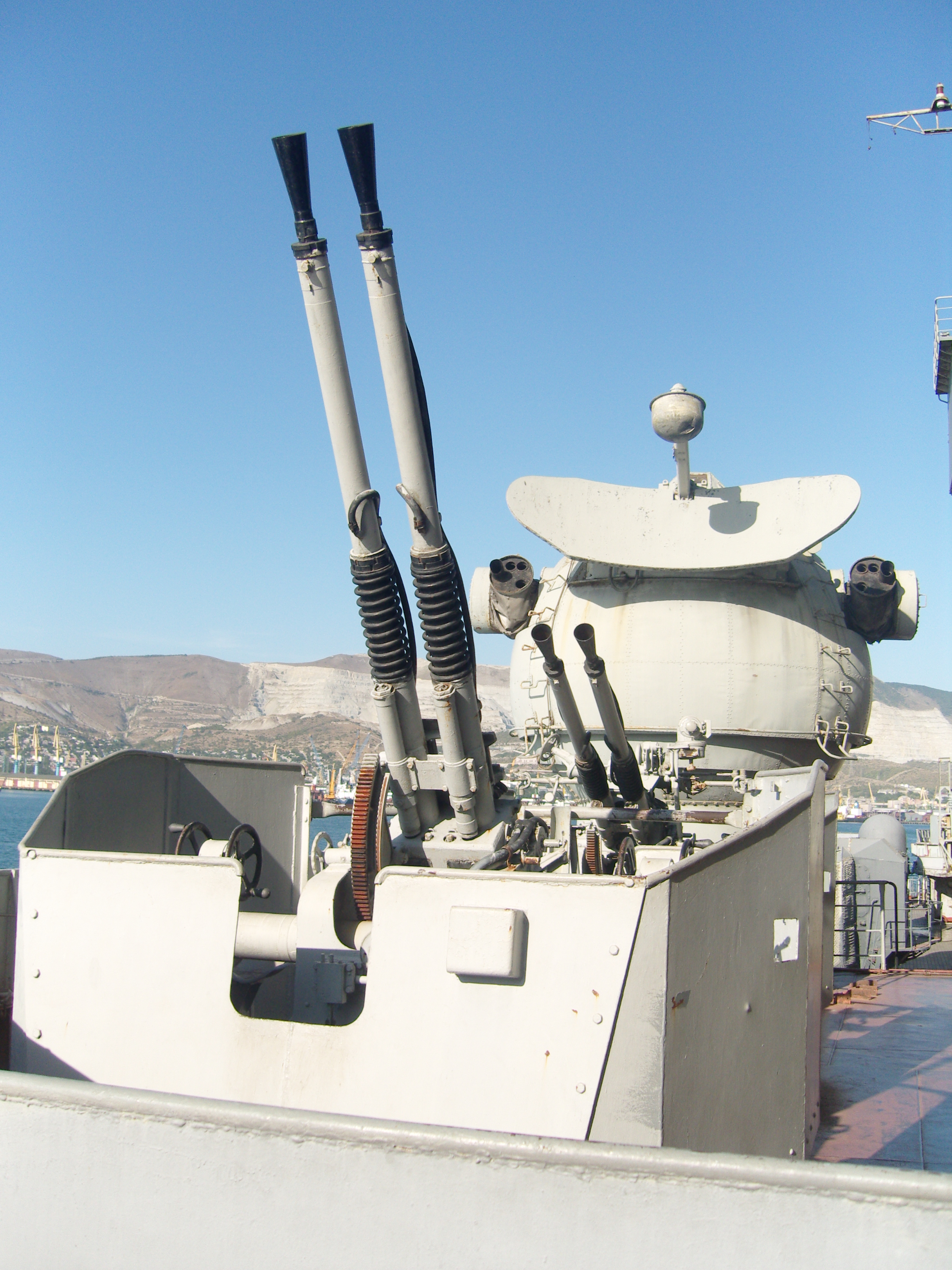 Зенитная батарея 37-мм зенитной артиллерии (37-мм спаренные АУ В-11)